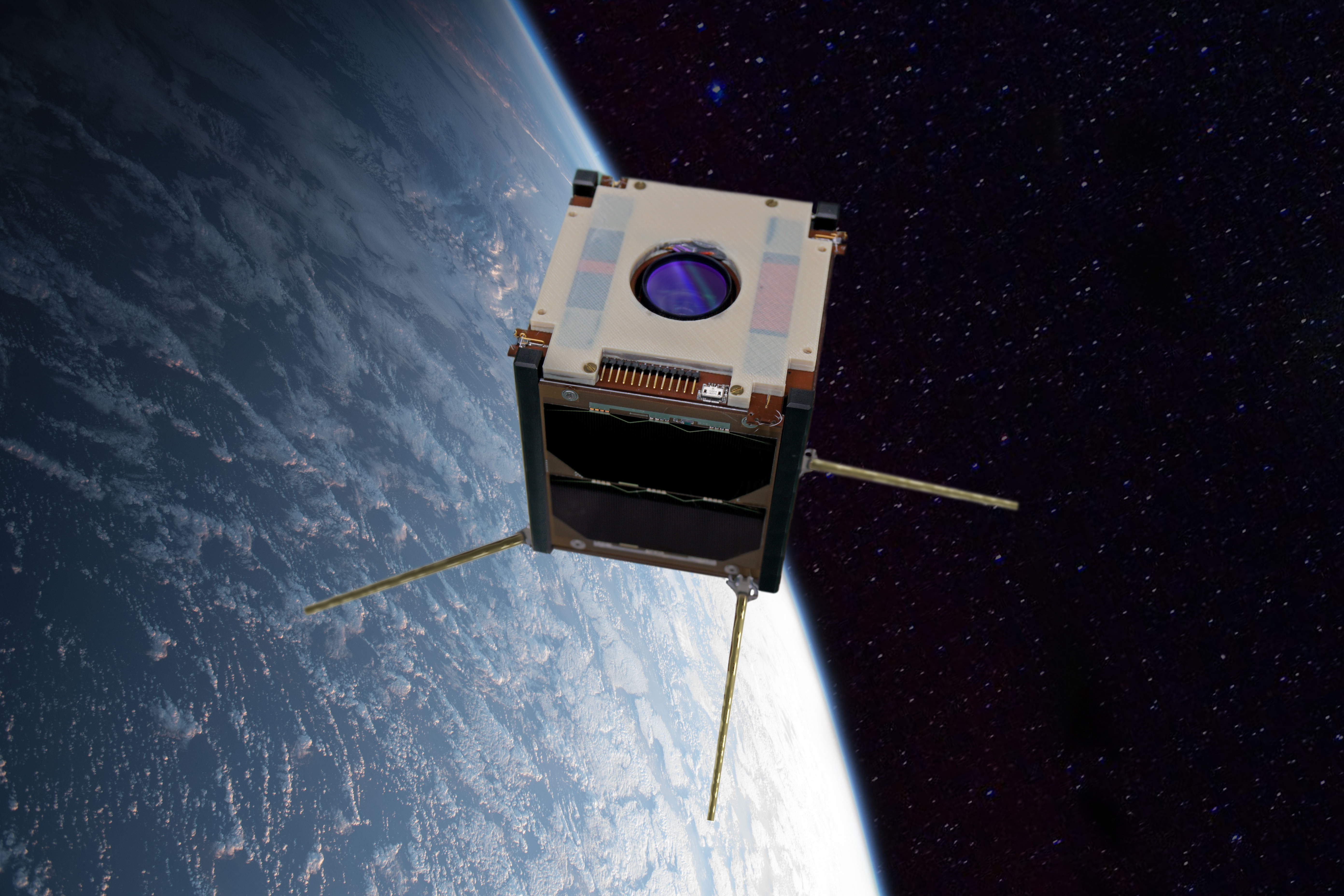 Hahmotelma Suomi 100 -satelliitista avaruudessa.